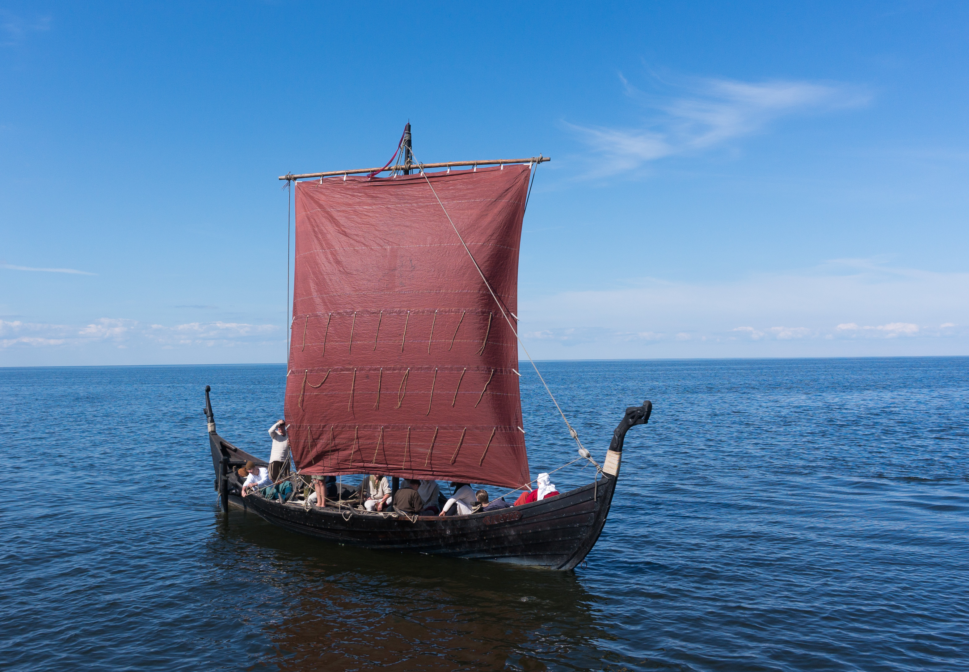 Viikingilaev Turm Peipsi järvel 2016